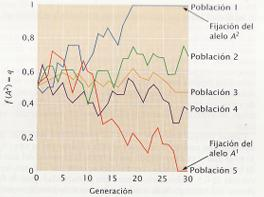 La deriva genética cambia las frecuencias alélicas dentro de las poblaciones, lo que conduce a una reducción de la variación genética a través de la fijación y la divergencia genética entre poblaciones. En la gráfica se muestra una simulación por computación de cambioes en la frecuencia del alelo A en 5 poblaciones diferentes debido a deriva genética aleatoria. Cada población consiste en 10 machos y 10 hembras y empieza con q=0.5